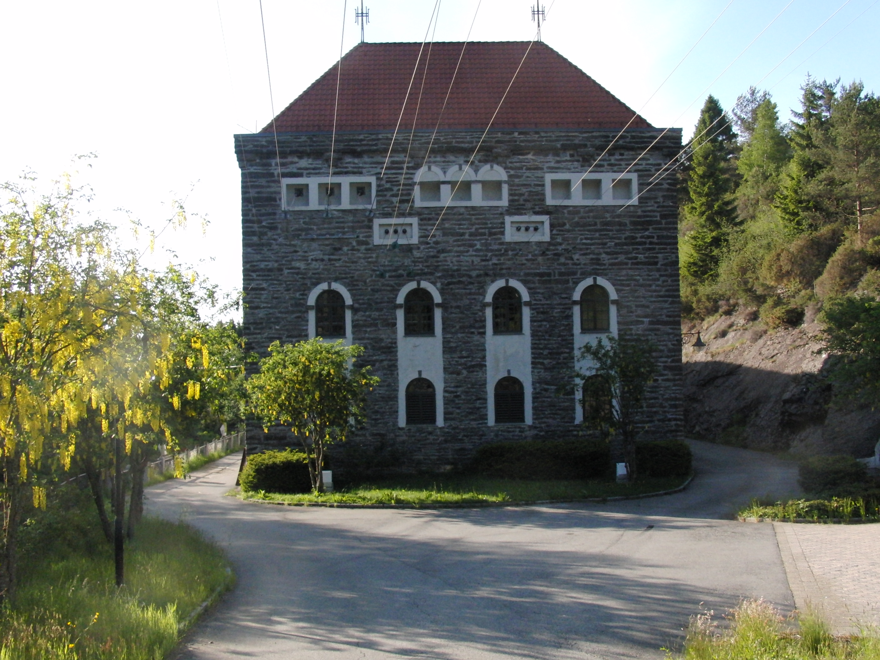 Herlandsfoss gamle kraftverk